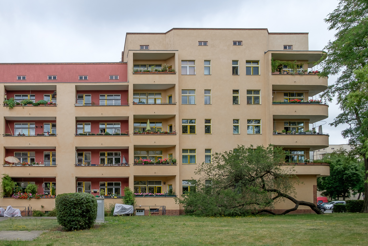 Roter süd-östlicher Gartenhof der Carl-Legien-Siedlung mit unterschiedichen - aber immer großen -, voneinander effektiv getrennten, regengeschützten und ruhig zum Hof gelegen Balkonen.